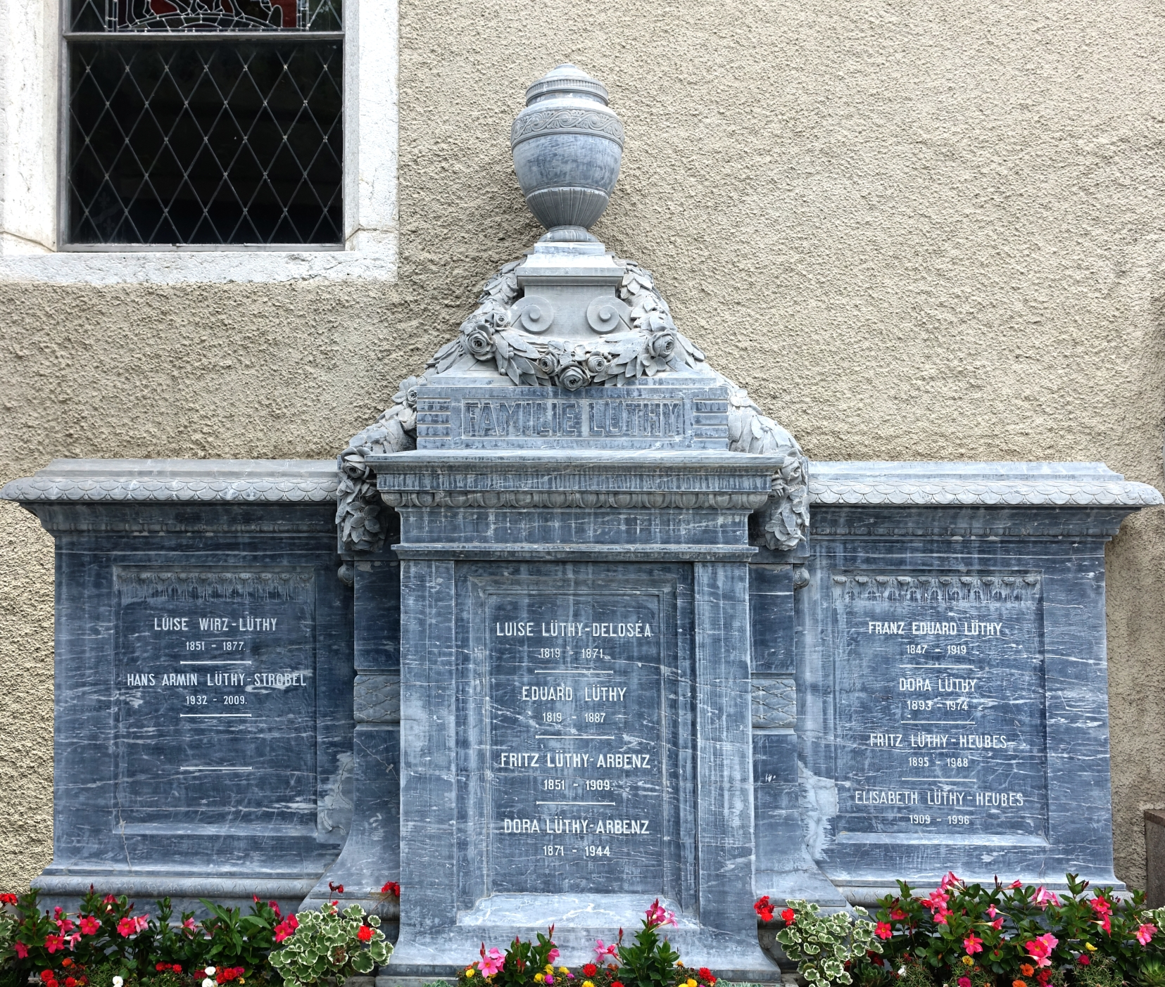 Hans Arnold Lüthy (1932-2009) Kunsthistoriker. Familien Grab, Feldbrunnen-St. Niklaus